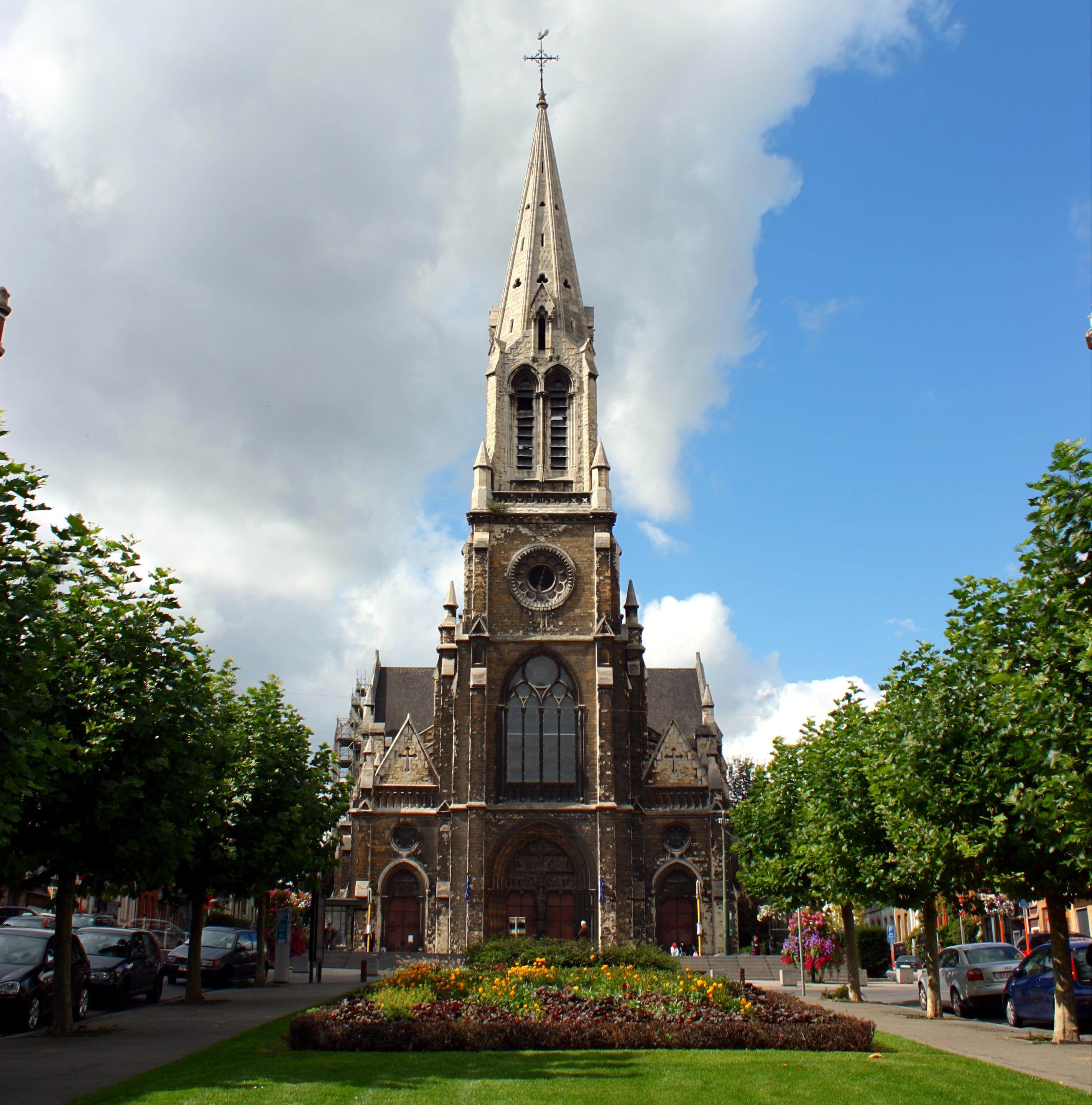 Vue de l'église Saint-Servais, située à Schaerbeek, depuis le parc lui faisant face. Monument classé n°2264-0055/0